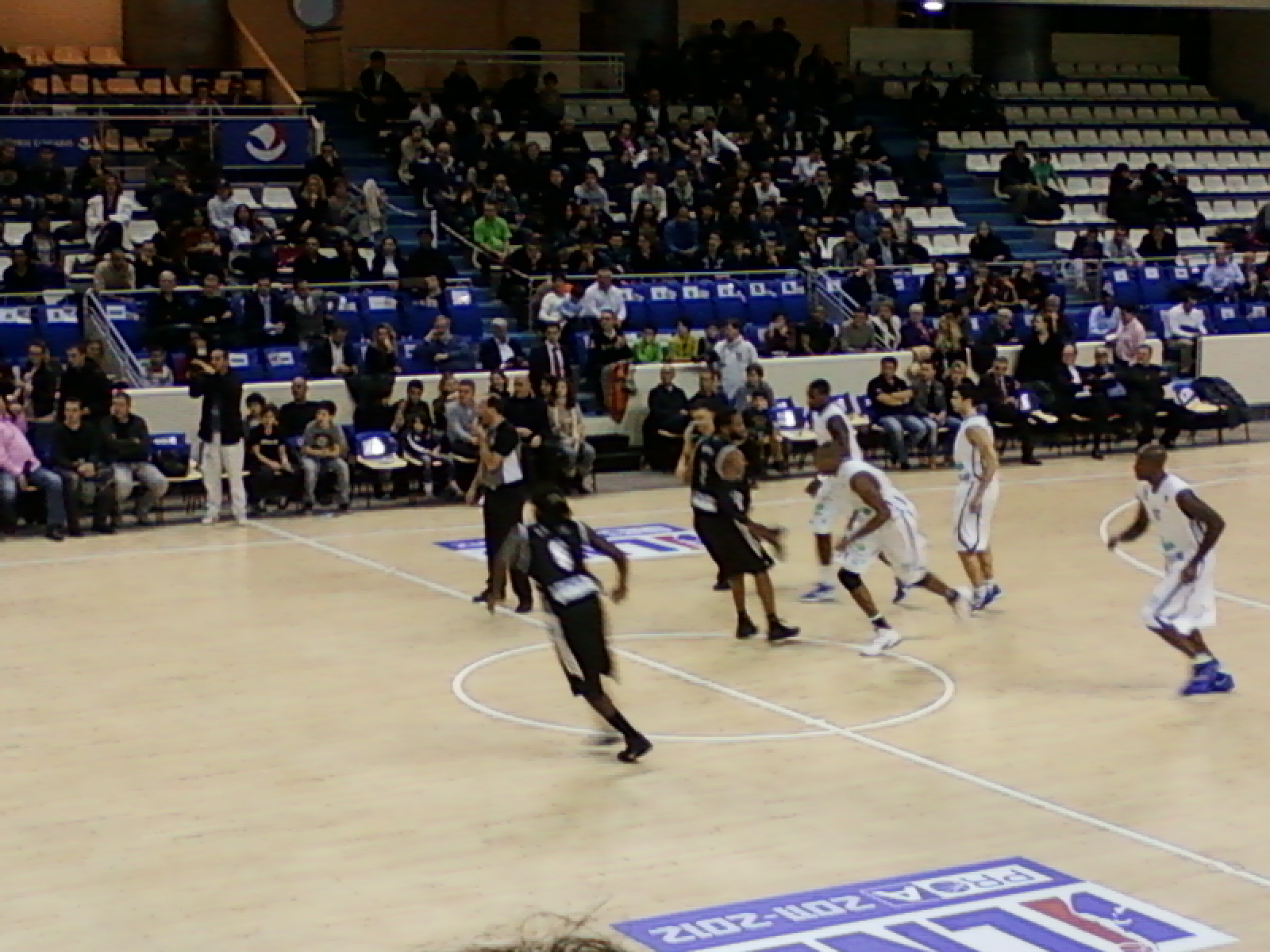 Coup d'envoi du match Paris Levallois - Dijon du 03 décembre 2011 en Pro A au stade Coubertin